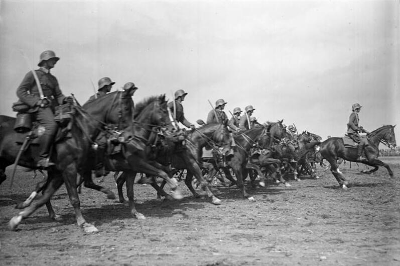 Die grosseReichswehrparade vor dem Reichspräsidenten von Hindenburg in Römhild in Thüringen! Galloppierende Kavallerie während der Parade vor dem Reichspräsidenten von Hindenburg.